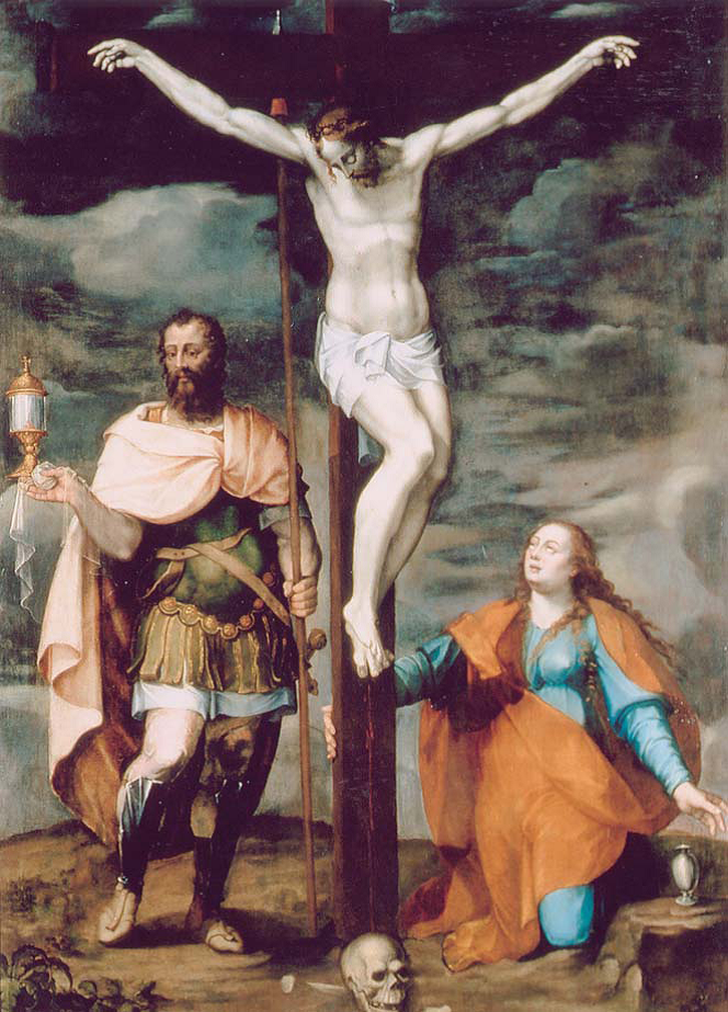 Crocifissione tra San Longino e la Maddalena